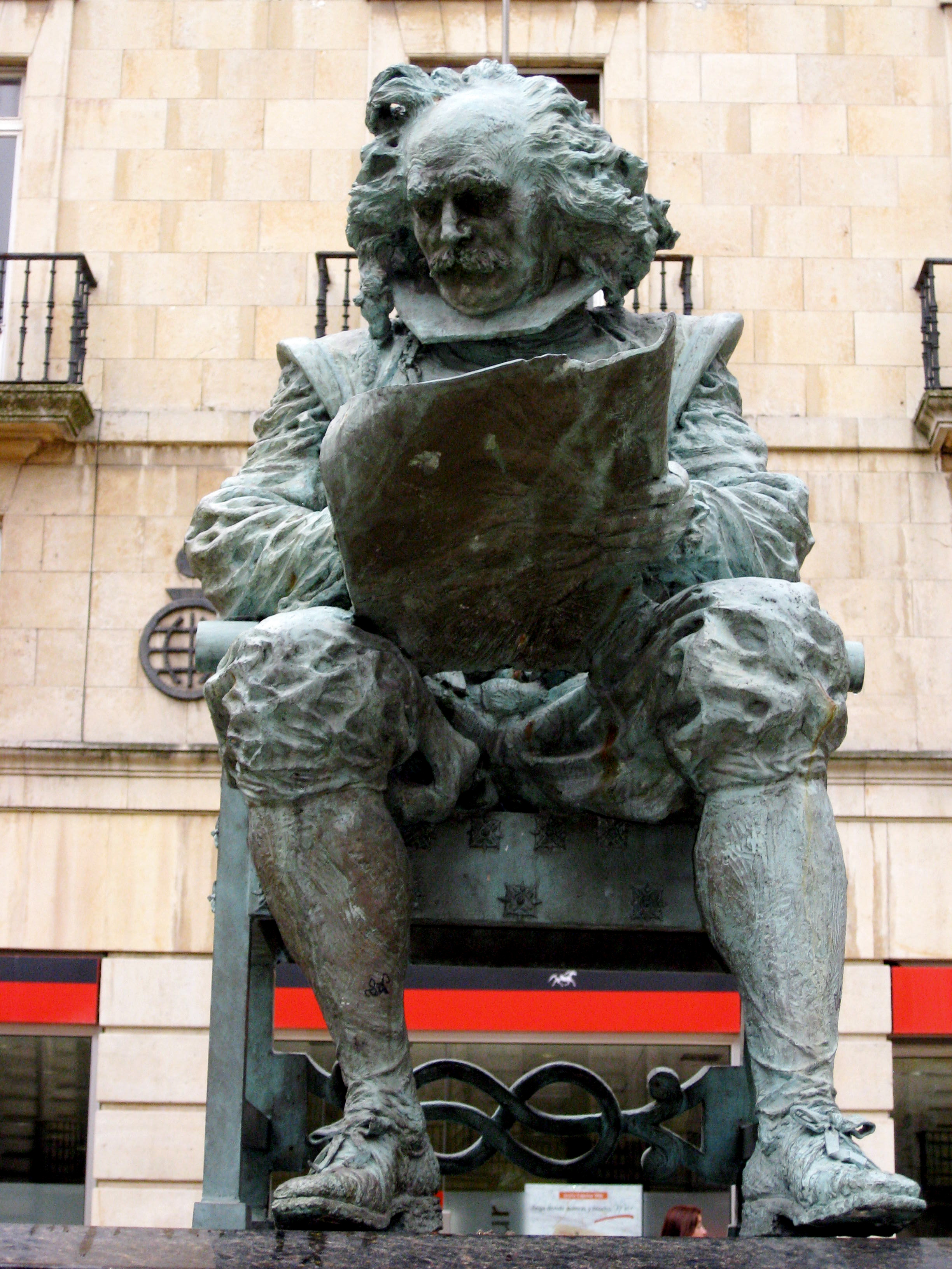 Estatua de Juan Carreño de Miranda